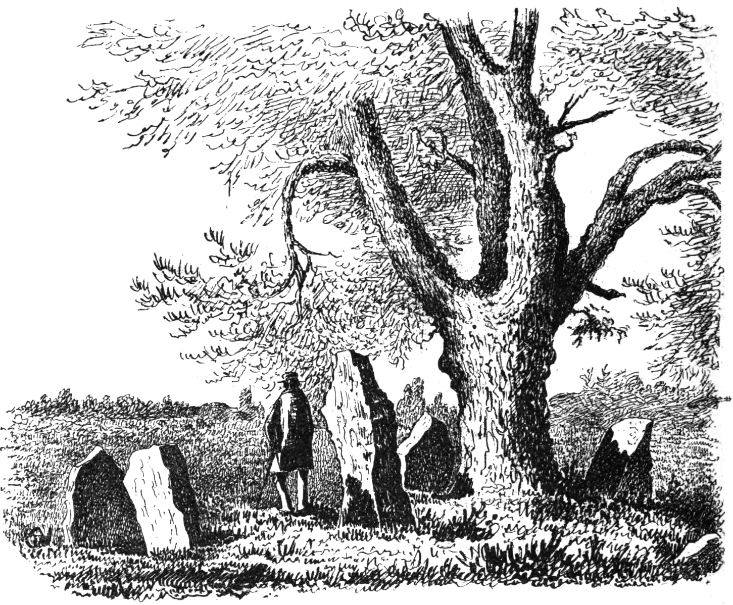 Jättekullen i Östra Tollstads socken i Östergötland. Teckning i "Utdrag af Antiqvitets-Intendenten P. A. Säves afgifna berättelse för år 1861", publicerad i Antiqvarisk tidskrift för Sverige band 1, 1864.